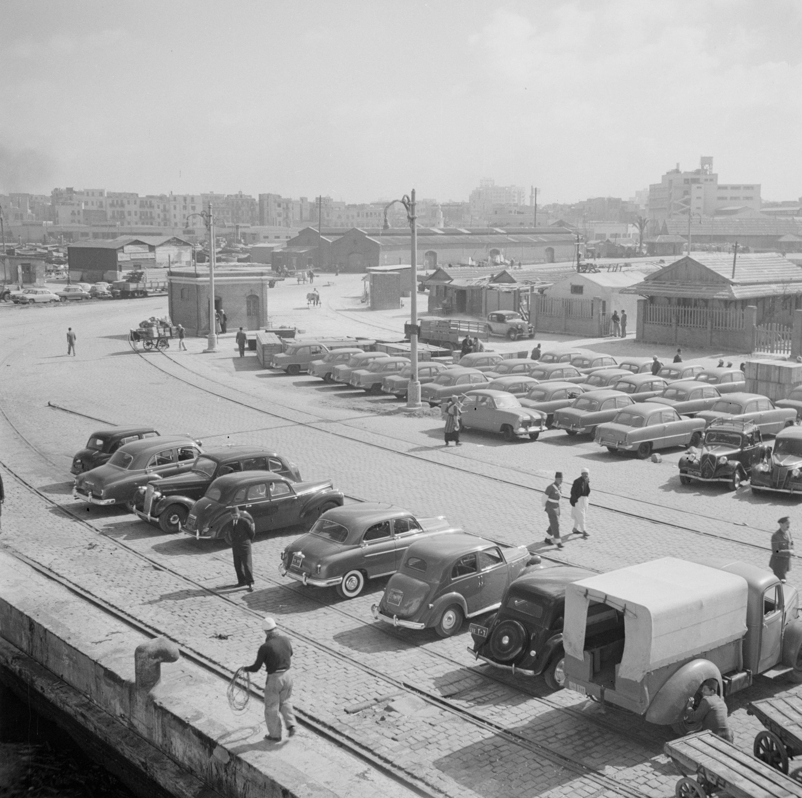 Collectie / Archief : Fotocollectie Van de Poll Reportage / Serie : Midden-Oosten 1950-1955: Egypte Beschrijving : Auto's op de kade in de haven van Alexandrië Datum : 1950 Locatie : Alexandrië, Egypte Trefwoorden : auto's, havens, kades, parkeerplaatsen Fotograaf : Poll, Willem van de Auteursrechthebbende : Nationaal Archief Materiaalsoort : Negatief (zwart/wit) Nummer archiefinventaris : bekijk toegang 2.24.14.02 Bestanddeelnummer : 255-6596